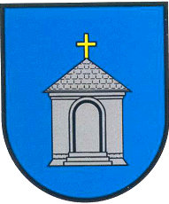 Herb miasteczka Wybranówka